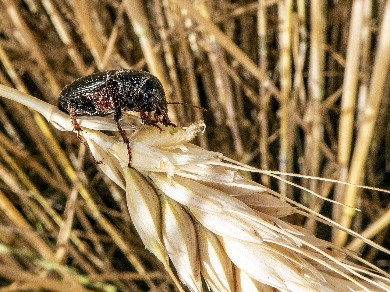 Łokaś garbatek (Zabrus gibbus)